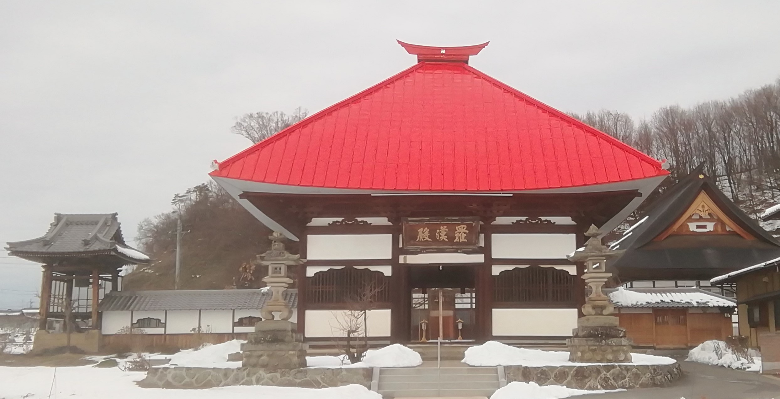 常楽寺（2020-2-12）